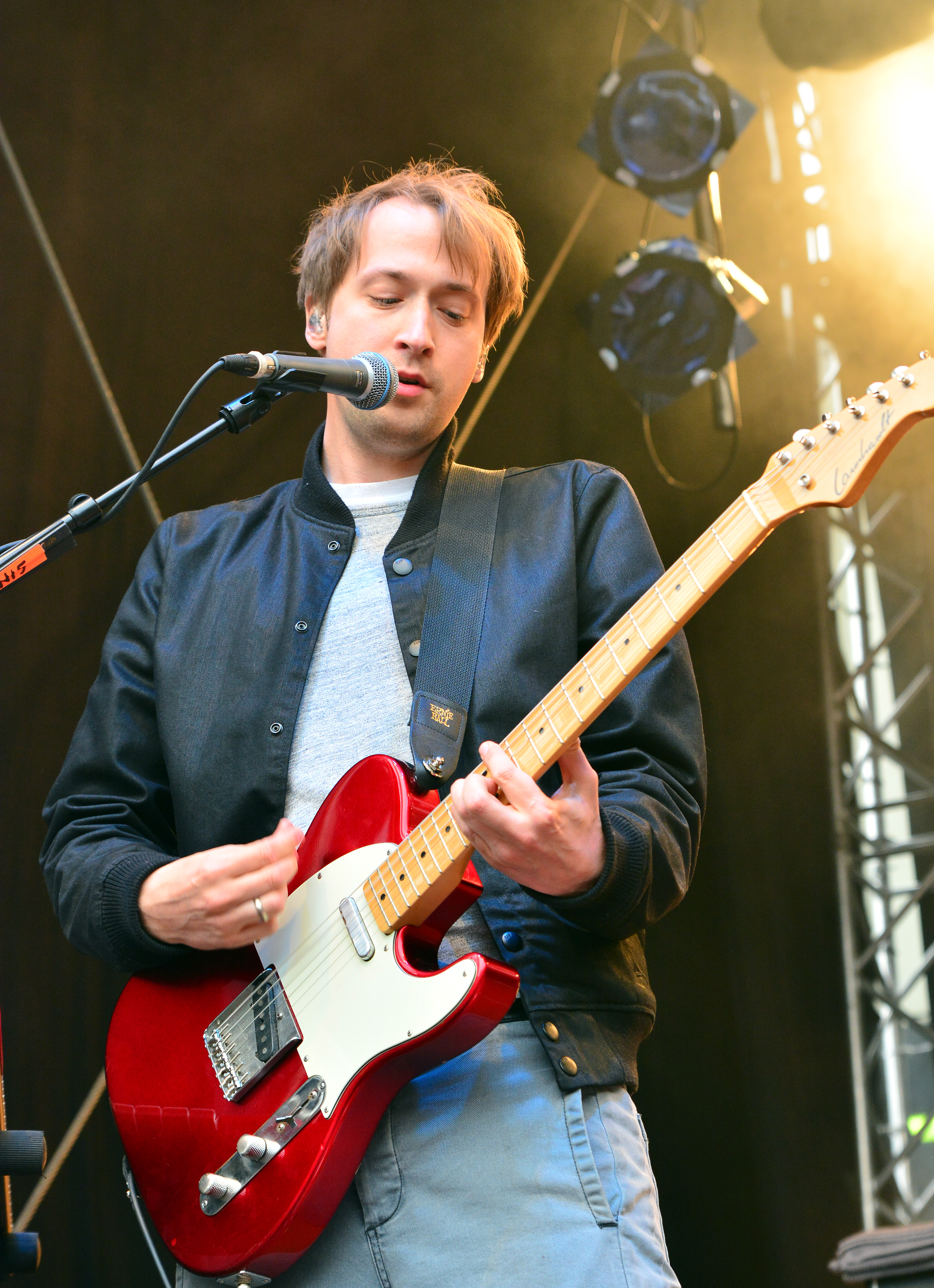 Juli beim „Holsten Brauereifest 2015“ in Hamburg